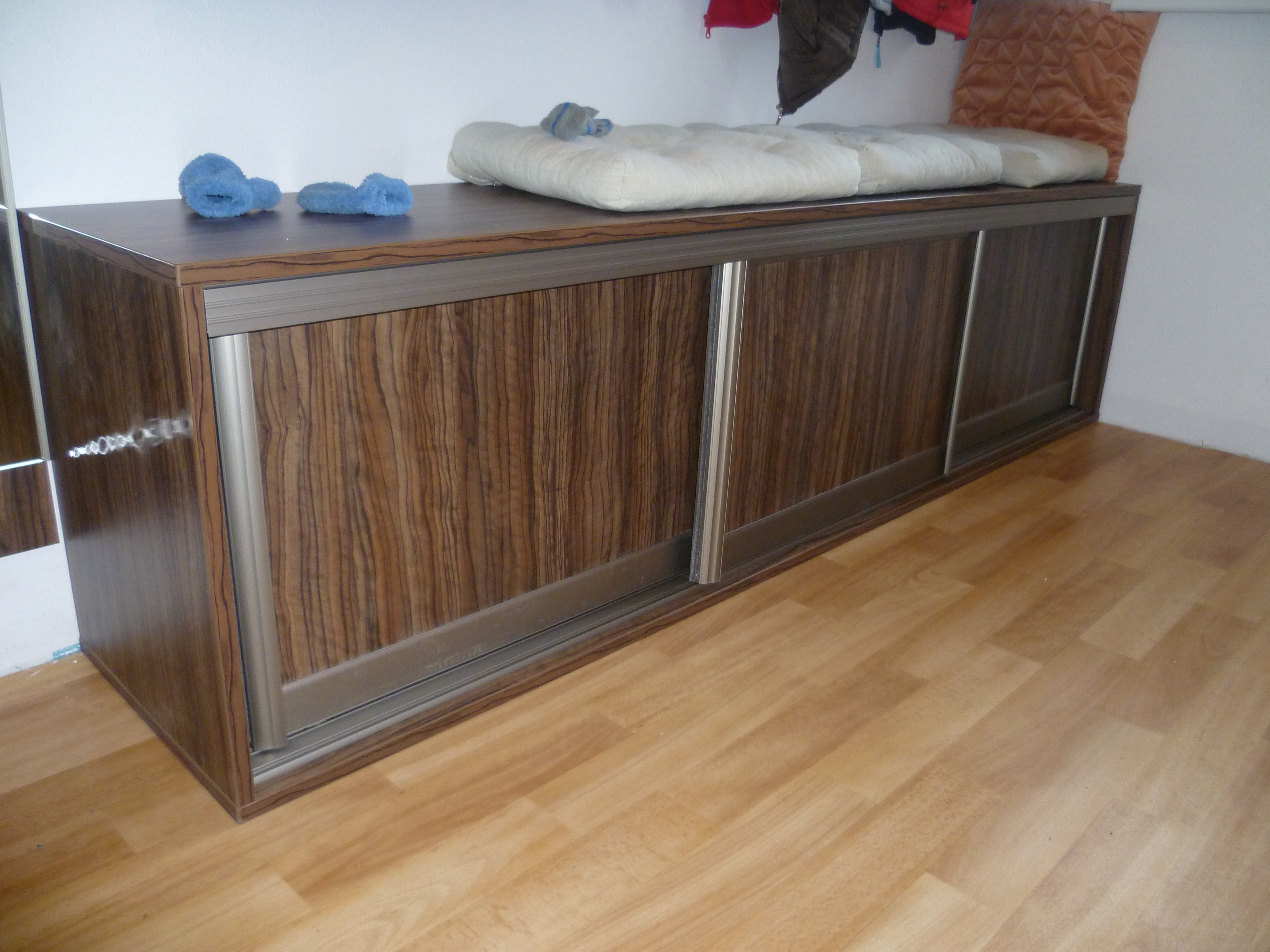 botník